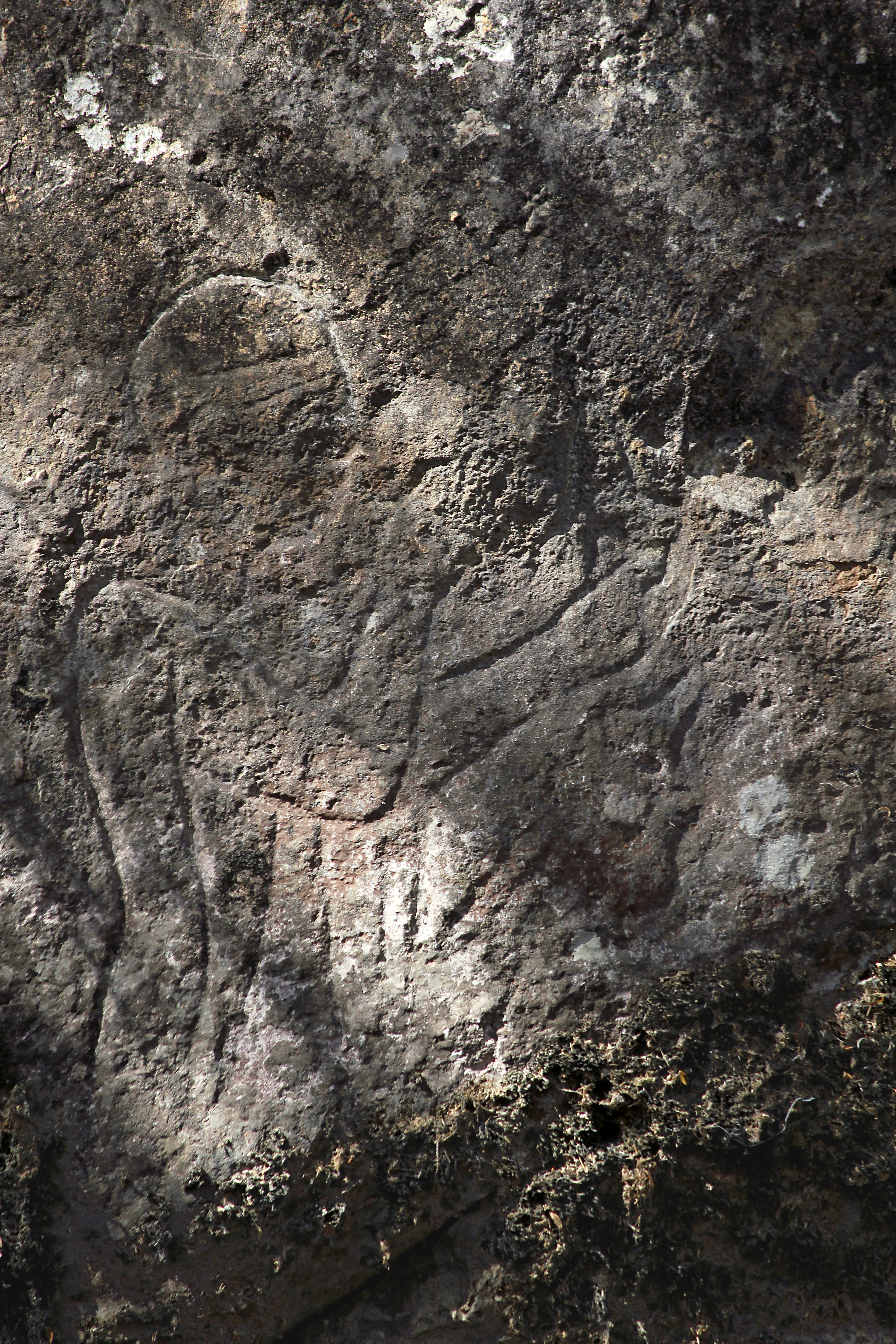 Taşçı B, hethitisches Felsrelief nahe Develi, Zentraltürkei